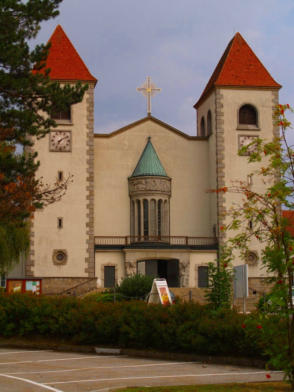 Herz Jesu Kirche in Gmünd Neustadt.